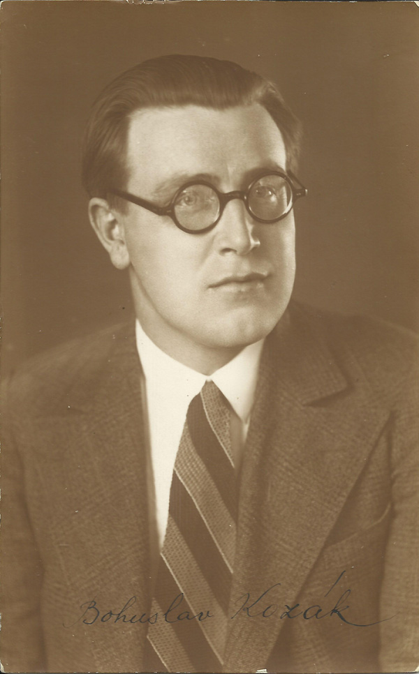 Bohuslav Kozák (1903 - 1938), Český malíř a profesor.